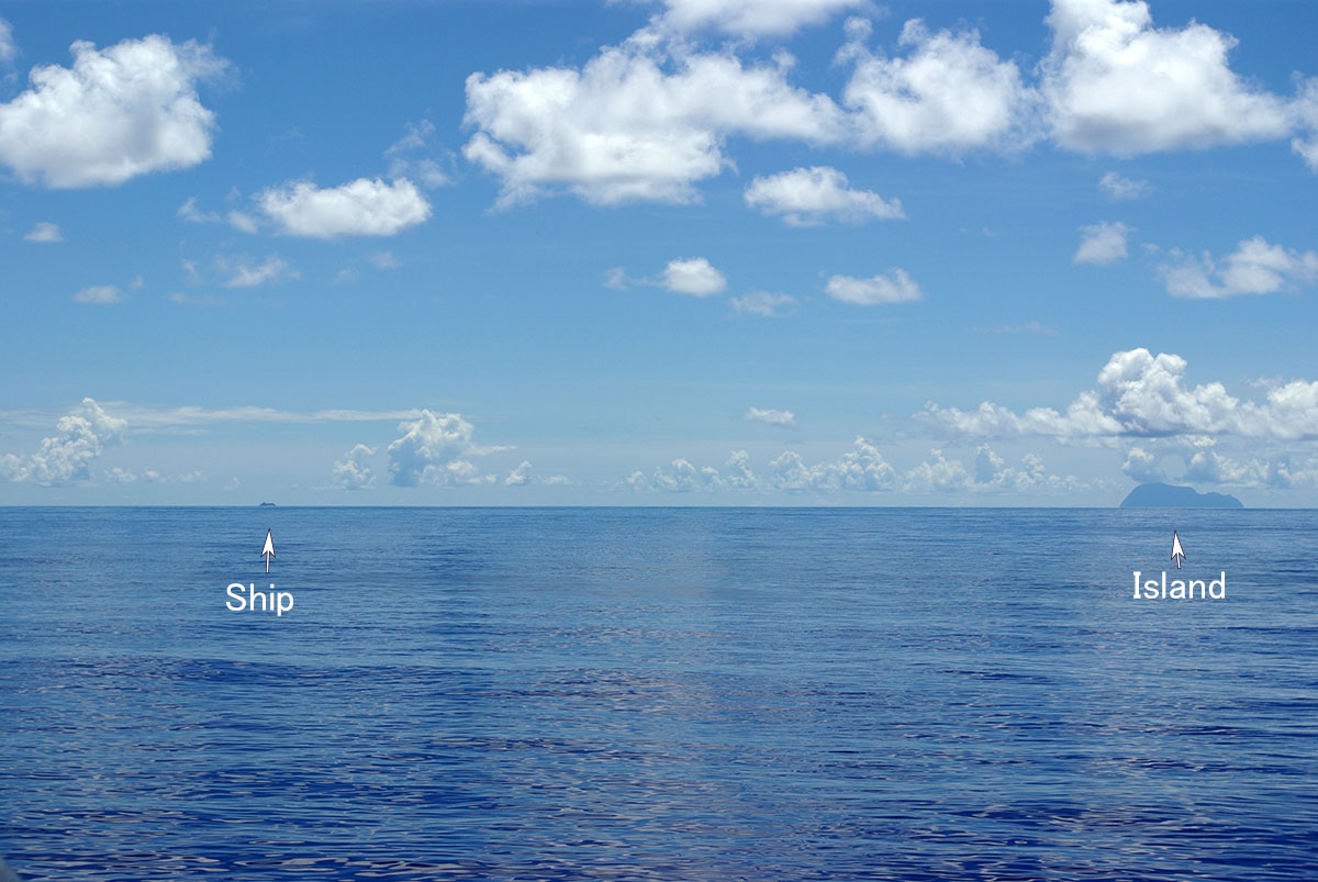 大地球形説の証拠として，「遠くの船は下が見えない」というものがあるが，古代では逆に「遠くの島を船から見えると上から見えはじめる」というのが正しい。実際に島と船を比べると，それがよく分かる。